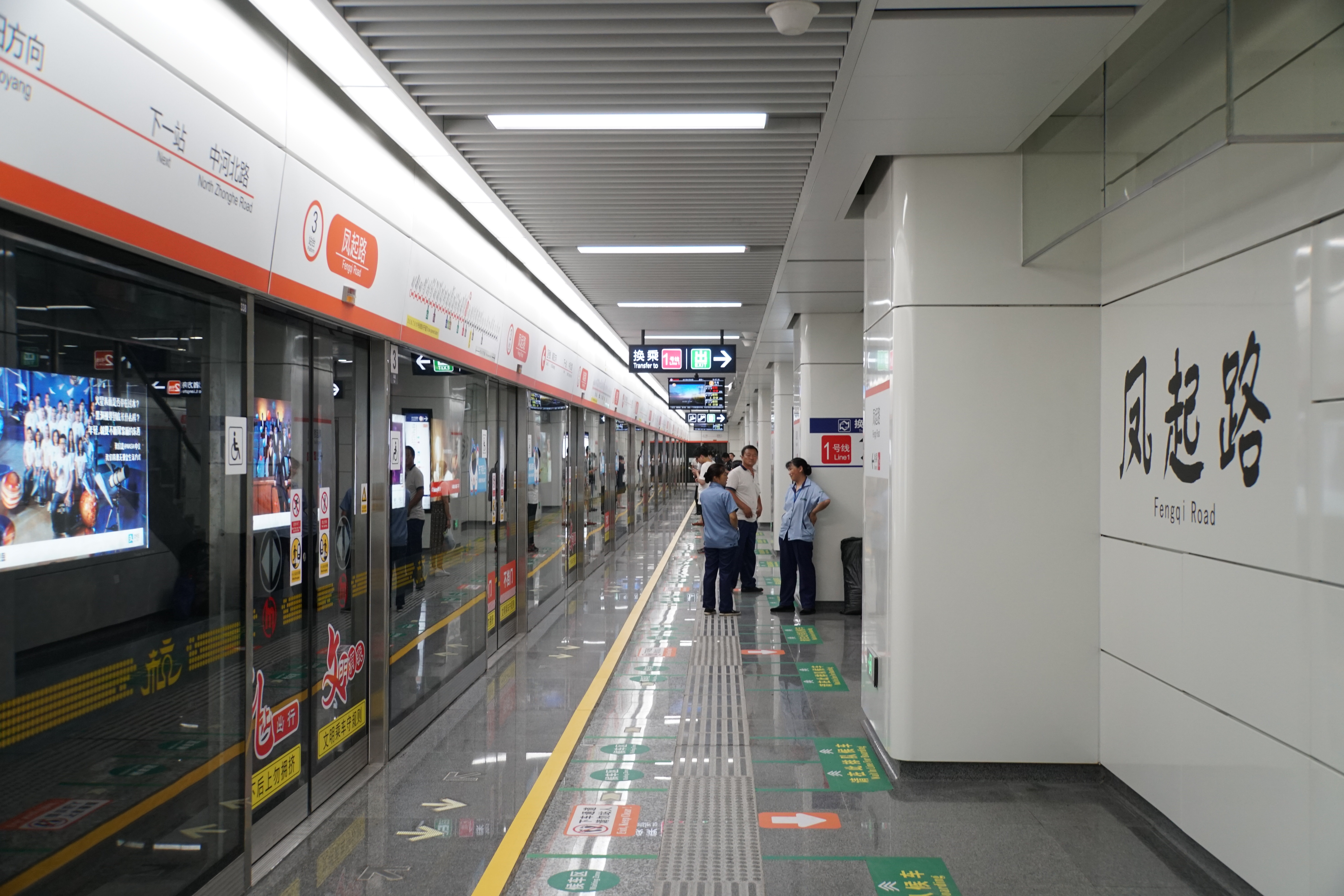 杭州地铁凤起路站2号线站台